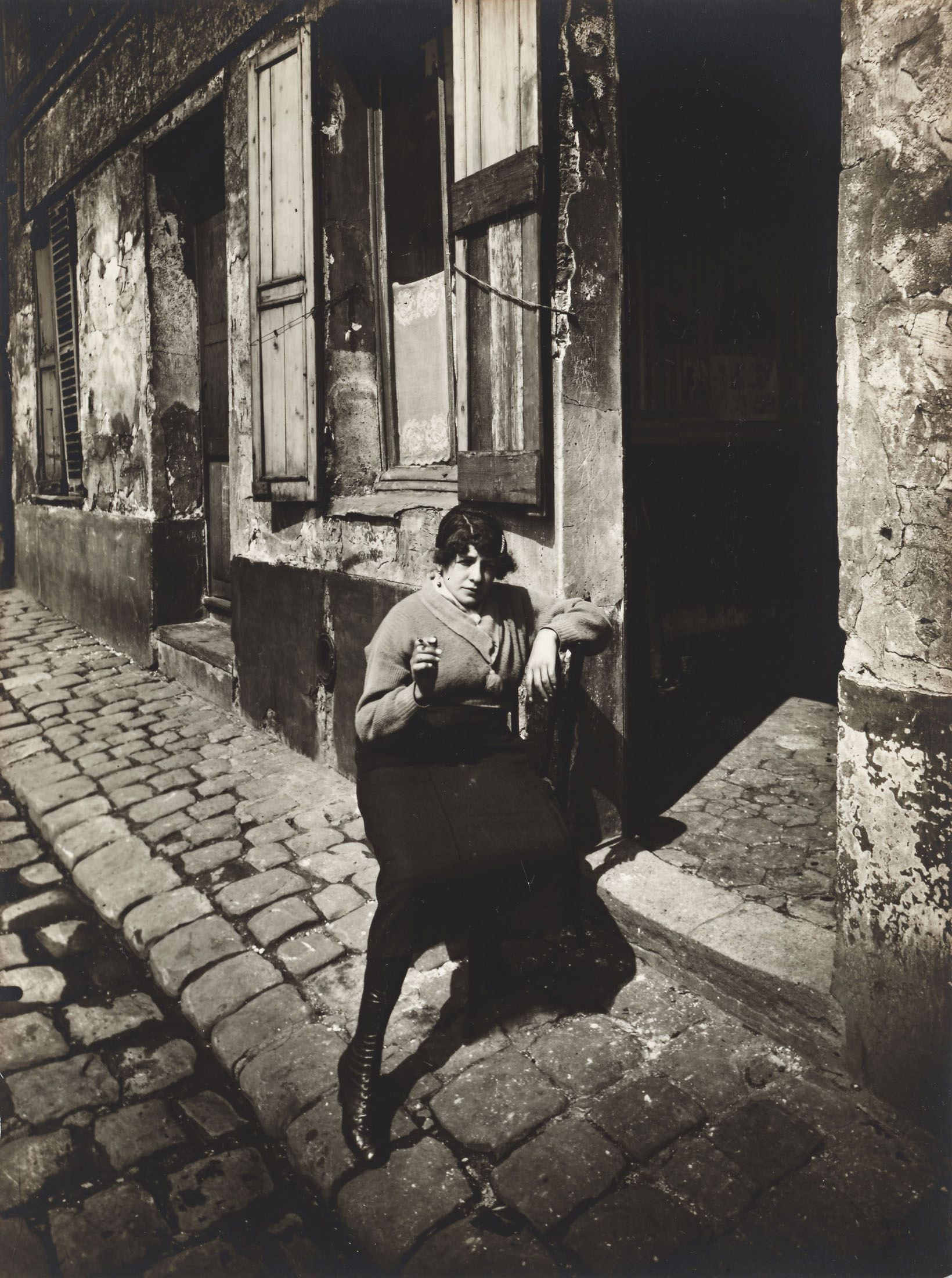 La Villette, fille publique faisant le quart, 19e, Paris. Silbergelatineabzug von Berenice Abbott, 1930er Jahre. 23,2 × 17,4 cm. Auf Originalkarton aufgezogen, darauf rückseitig Stempel: „Photograph by Eugene Atget, Copyright: Berenice Abbott, Reproduction rights reserved“.